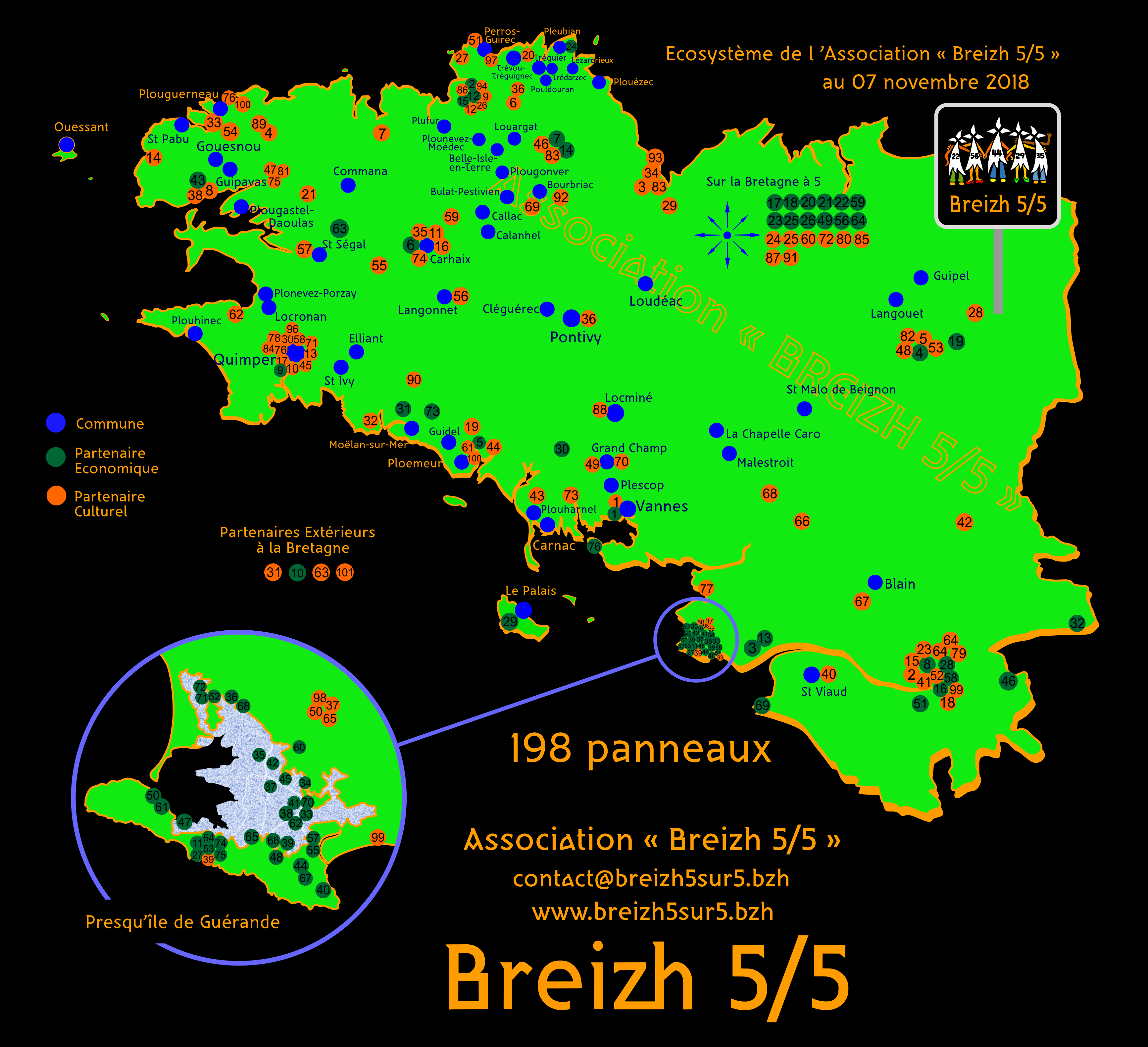 Etat de la distribution des panneaux Breizh 5 su 5 au 7/11/2018